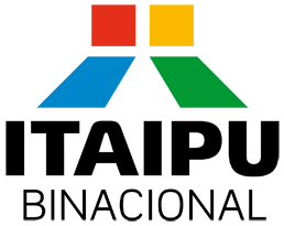 Logomarca Itaipu atualizada conforme Manual de Identidade Visual da Empresa